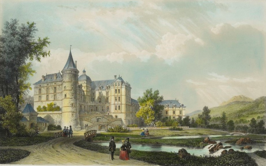 Estampe d'Alexandre Debelle du château de Vizille avant son incendie de 1865. La salle du jeu de paume qui n'existe plus de nos jours est sur la droite, en partie cachée par un arbre. C'est dans cette salle que s'est tenue la réunion des États généraux de la province du Dauphiné le 21 juillet 1788, élément déterminant dans la convocation des États généraux ouverts le 5 mai 1789 à Versailles.